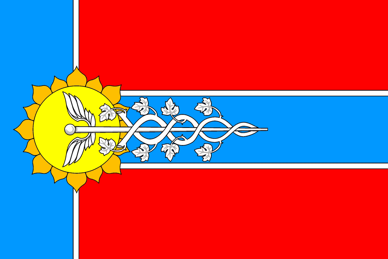 Флаг города Армавир (Краснодарский край). Флаг муниципального образования город Армавир представляет собой красное прямоугольное полотнище с отношением ширины к длине 2:3, разделённое на четыре полосы: три горизонтальные равной ширины (две красные и между ними одна голубая) и одна вдоль древка – голубая в 1/5 длины полотнища. Красные и голубые участки полотнища разделены белыми контурами. Поверх середины границы вертикальной голубой полосы воспроизведён жёлтый с оранжевыми лепестками цветок подсолнуха; голубой участок полотнища несёт со смещением к древку белое изображение кадуцея особого вида (в виде трости с крыльями у навершия и с двумя переплетенными виноградными лозами), навершие которого расположено поверх цветка